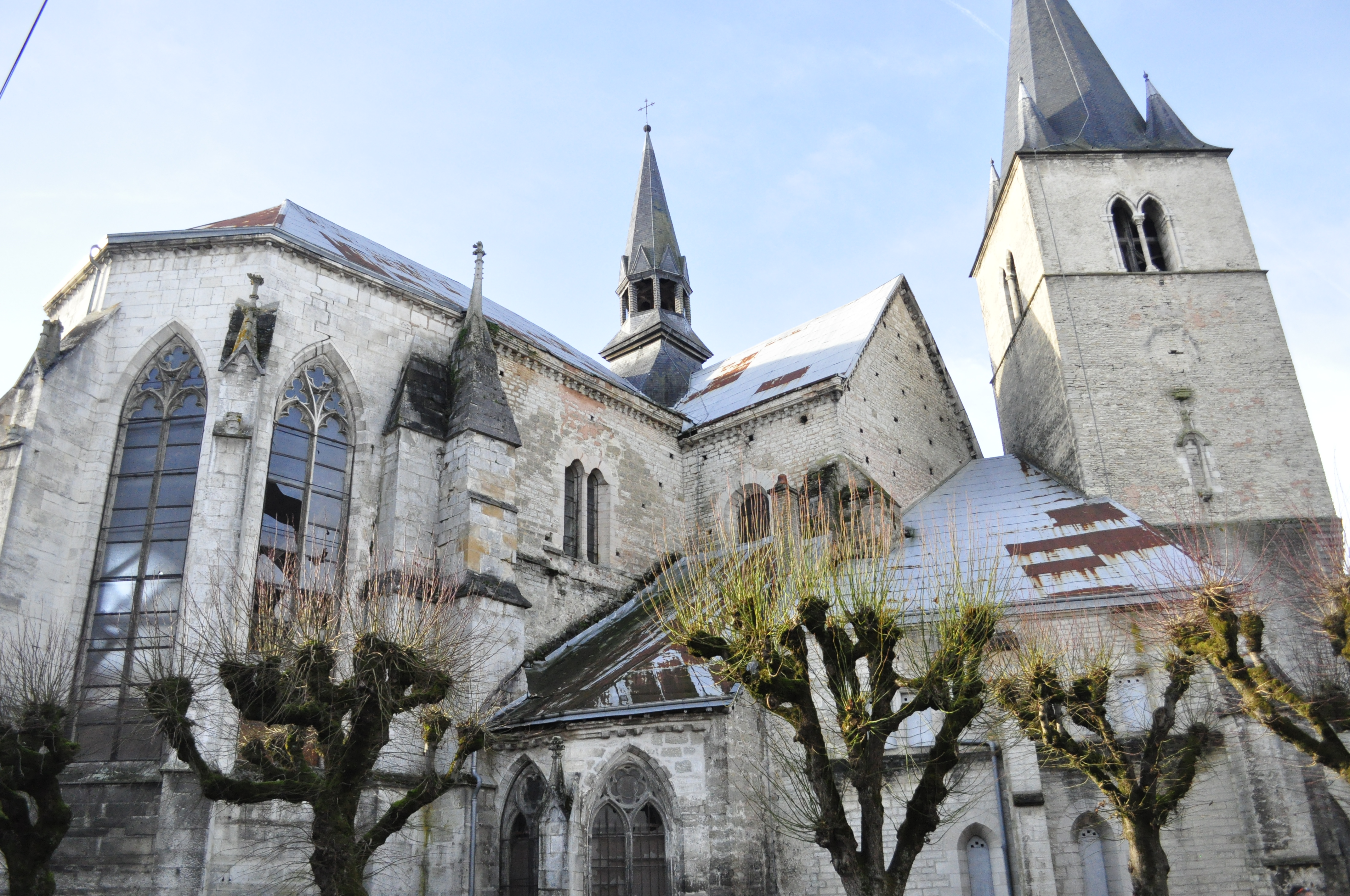 Bar-sur-Aube : église Saint Maclou